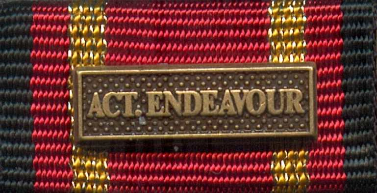 Bandschnalle Einsatzabzeichen der Bundeswehr Active Endeavour